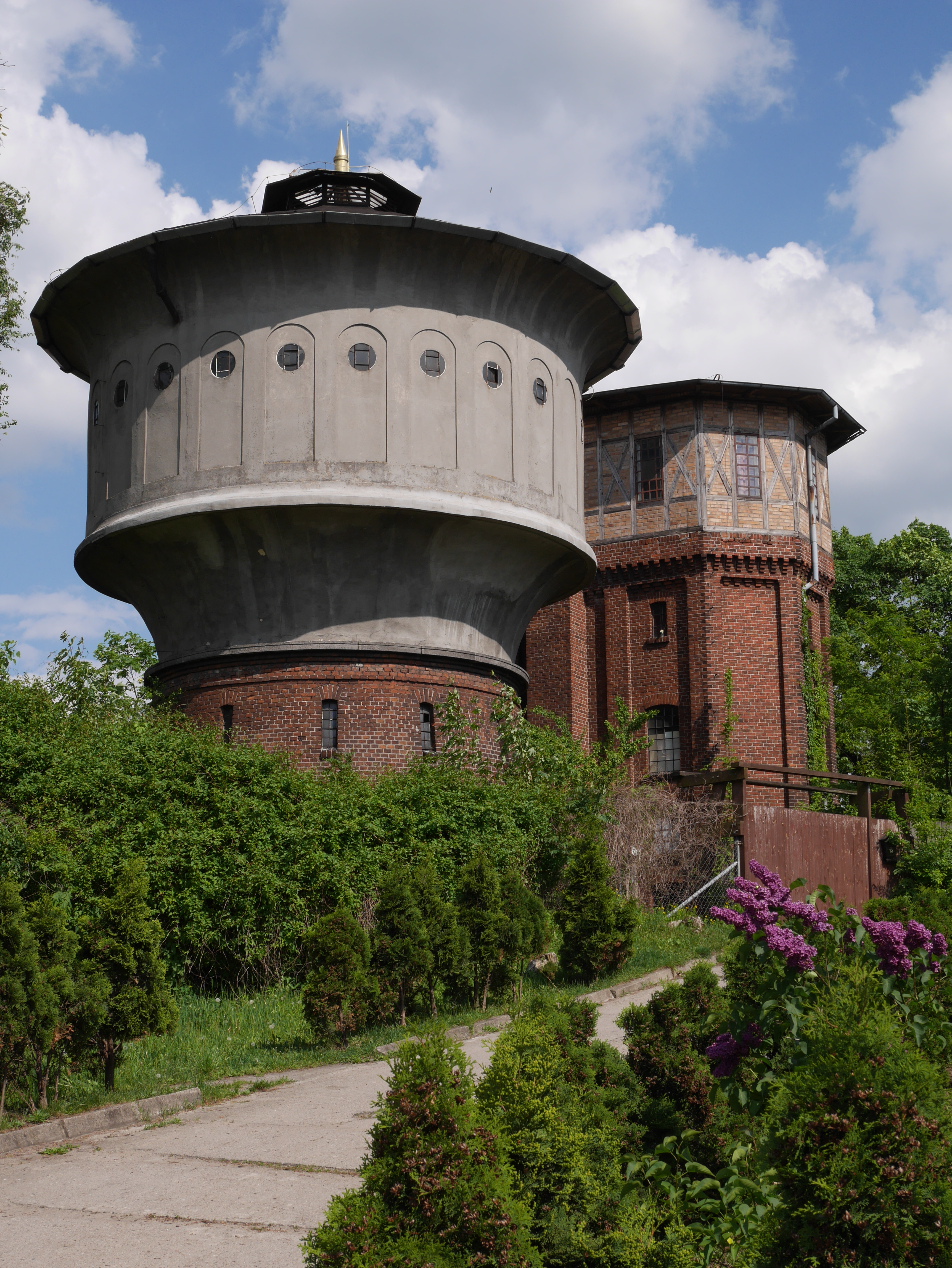 Wieża ciśnień przy stacji PKP w Iławie